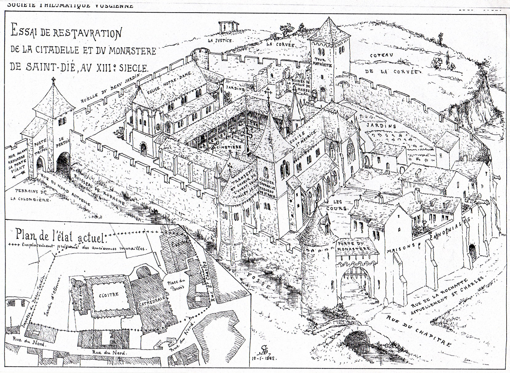 "Essai de restauration de la citadelle et du monastère de Saint-Dié au XIIIe siècle" [Vue restitutive de la cité médiévale de Saint-Dié-des-Vosges]